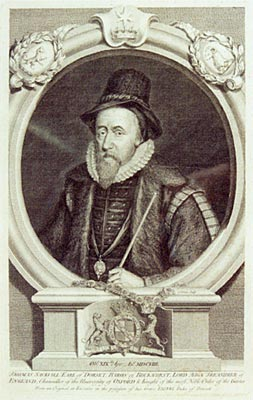 Portrait de Thomas Sackville de Dorset